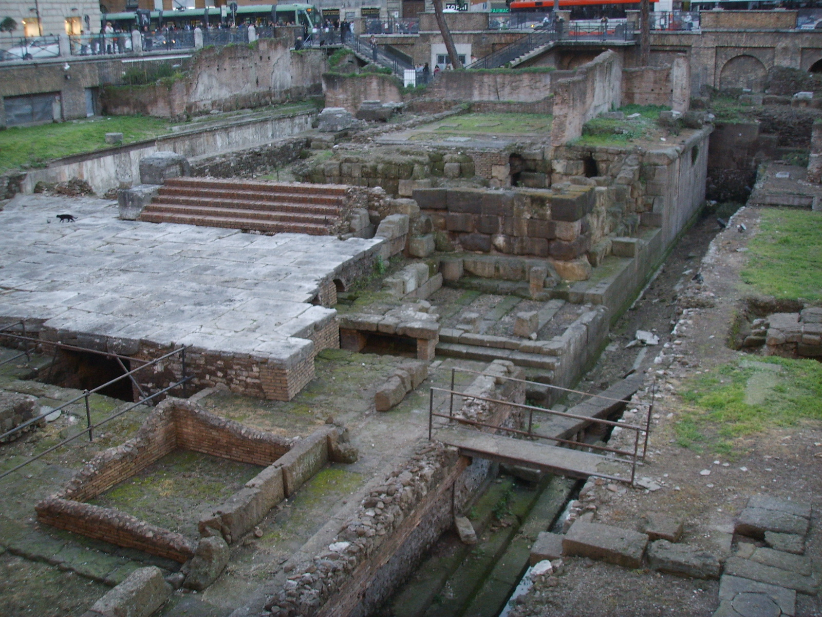 Il "Tempio C" dell'Area Sacra di Largo di Torre Argentina a Roma, risalente al IV/III secolo a.C. S'ipotizza che sia quello, arcaico, dedicato alla dea Feronia.